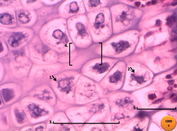 Joelho de rato – HE – 1000x Legenda: 1.Condrócito hipertrofiado 2.Condrócito em apoptose 3.Zona de calcificação 4.Matriz cartilaginosa calcificando 5.Zona de ossificação